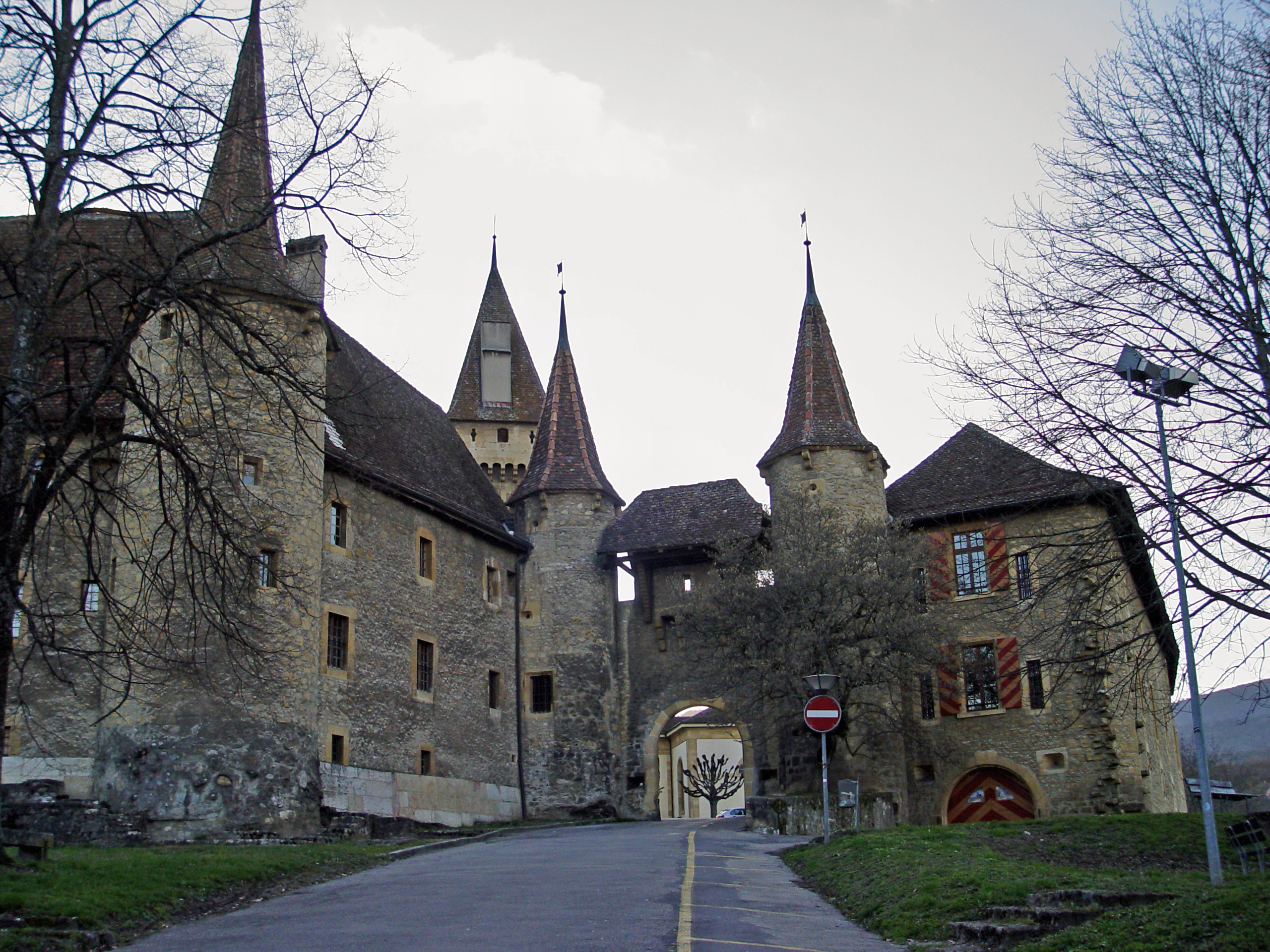 Schloss Colombier